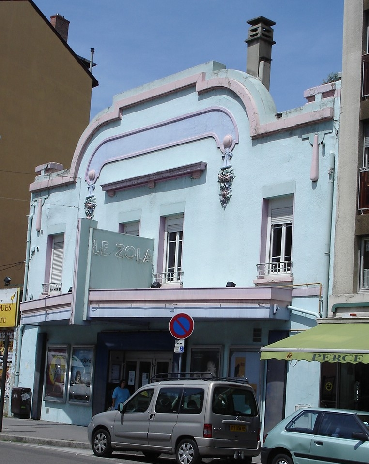 Cinéma Le Zola à Villeurbanne